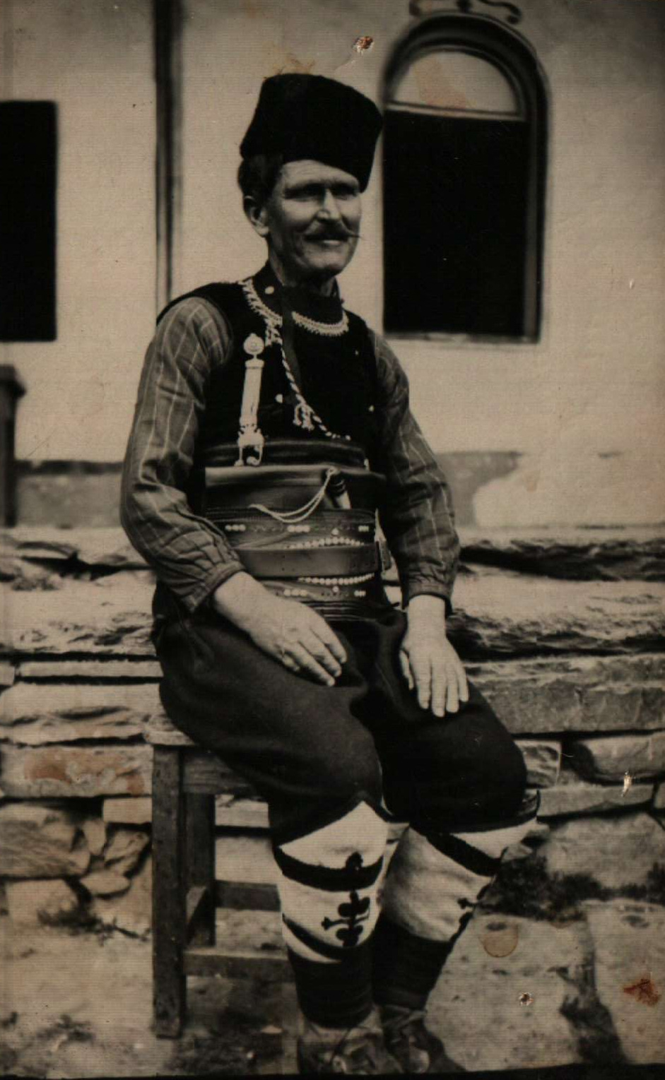 Снимка на Дончо Христов Шопов, участник в национално-освободителното движение в Македония, Рила, Кюстендилско.